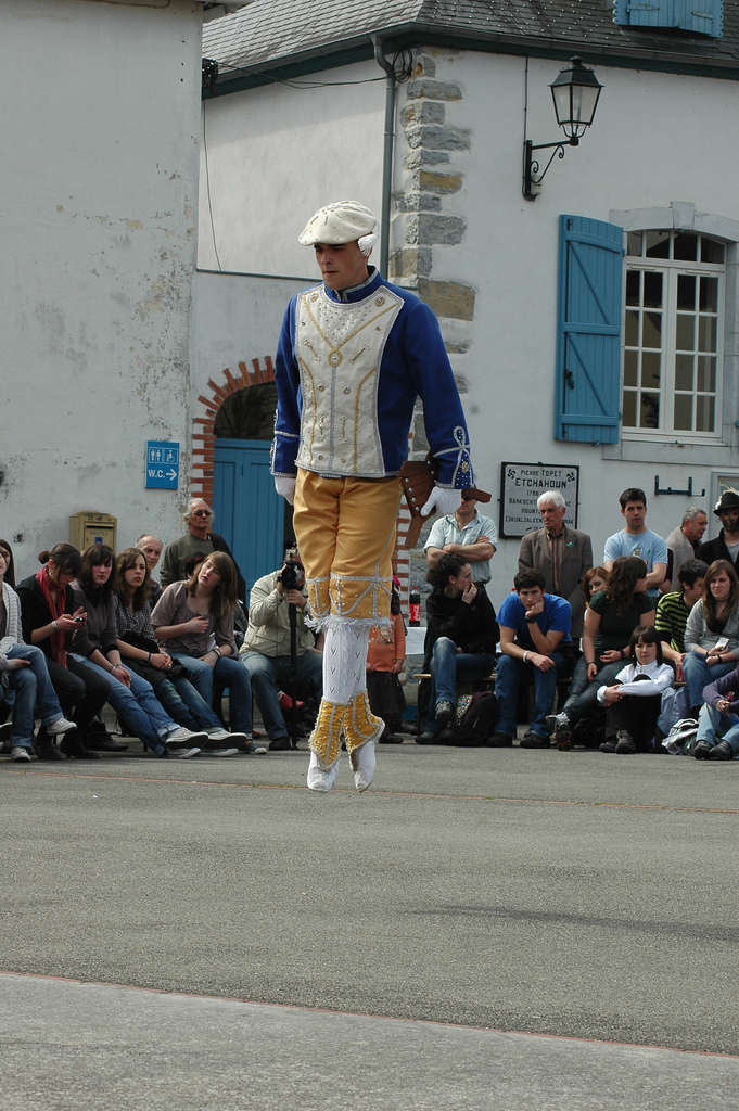 Larraineko maskarada Barkoxen. 2010-03-27. Gathuzain.